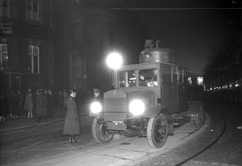 Demonstrationsverbot in Berlin! Infolge der Ruhestörungen durch die Aufführung des Remarque-Films "Im Westen nichts Neues" ist ein Demonstrationsverbot für Berlin erlassen worden. Die Polizei sicherte die Strassen und Plätze im Berliner Westen mit Wasserwerfer und grossem Polizeiaufgebot. Der Wasserwerfer der Schutzpolizei am Wittenbergplatz in Berlin zur Verhinderung nächtlicher Demonstrationen.